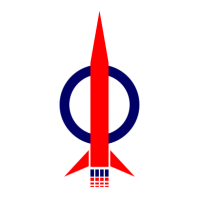 Parteilogo - Democratic Action Party (DAP)